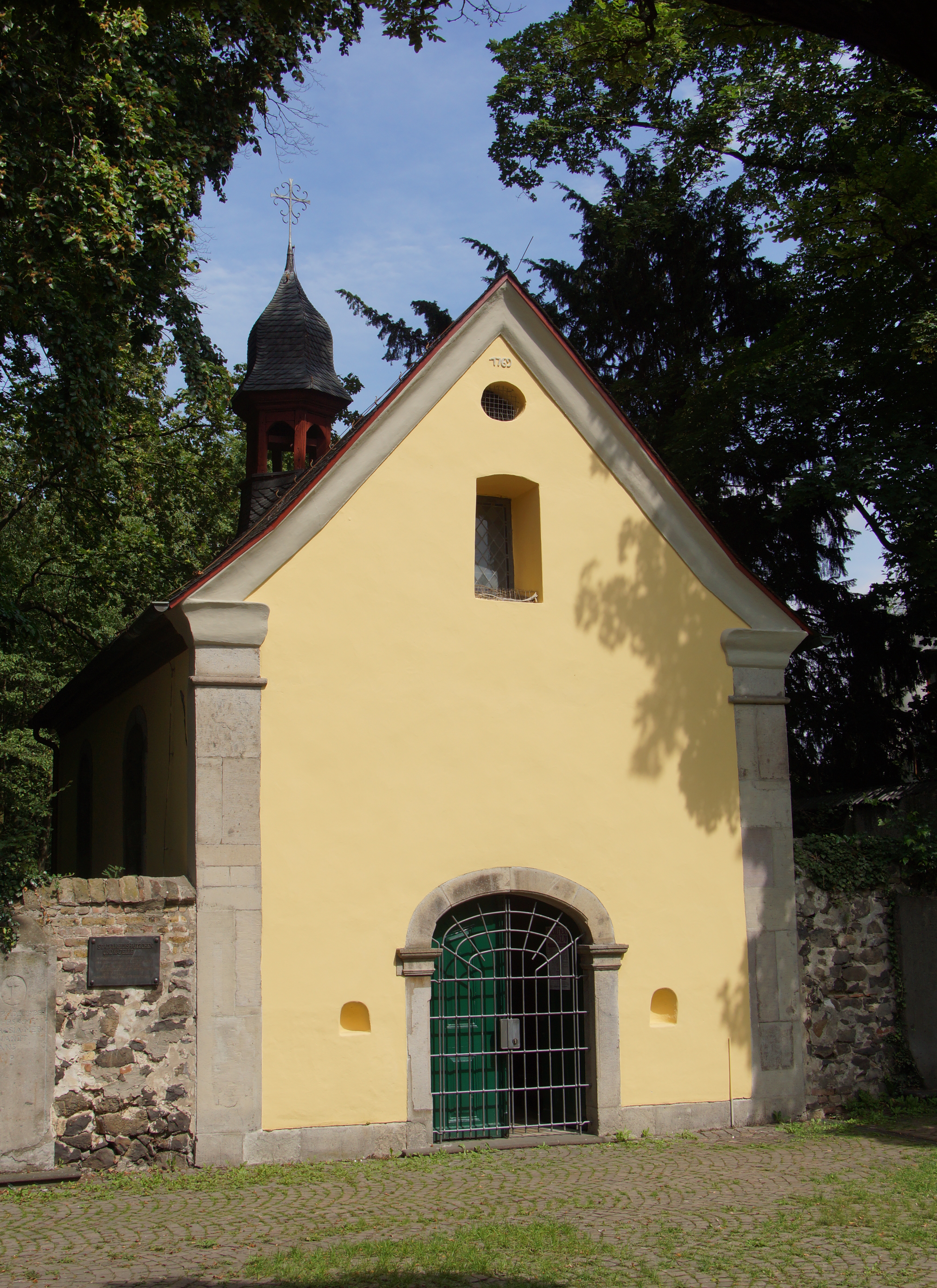 Kapelle St. Adelheidis in Pützchen-Bechlinghoven, Bonn